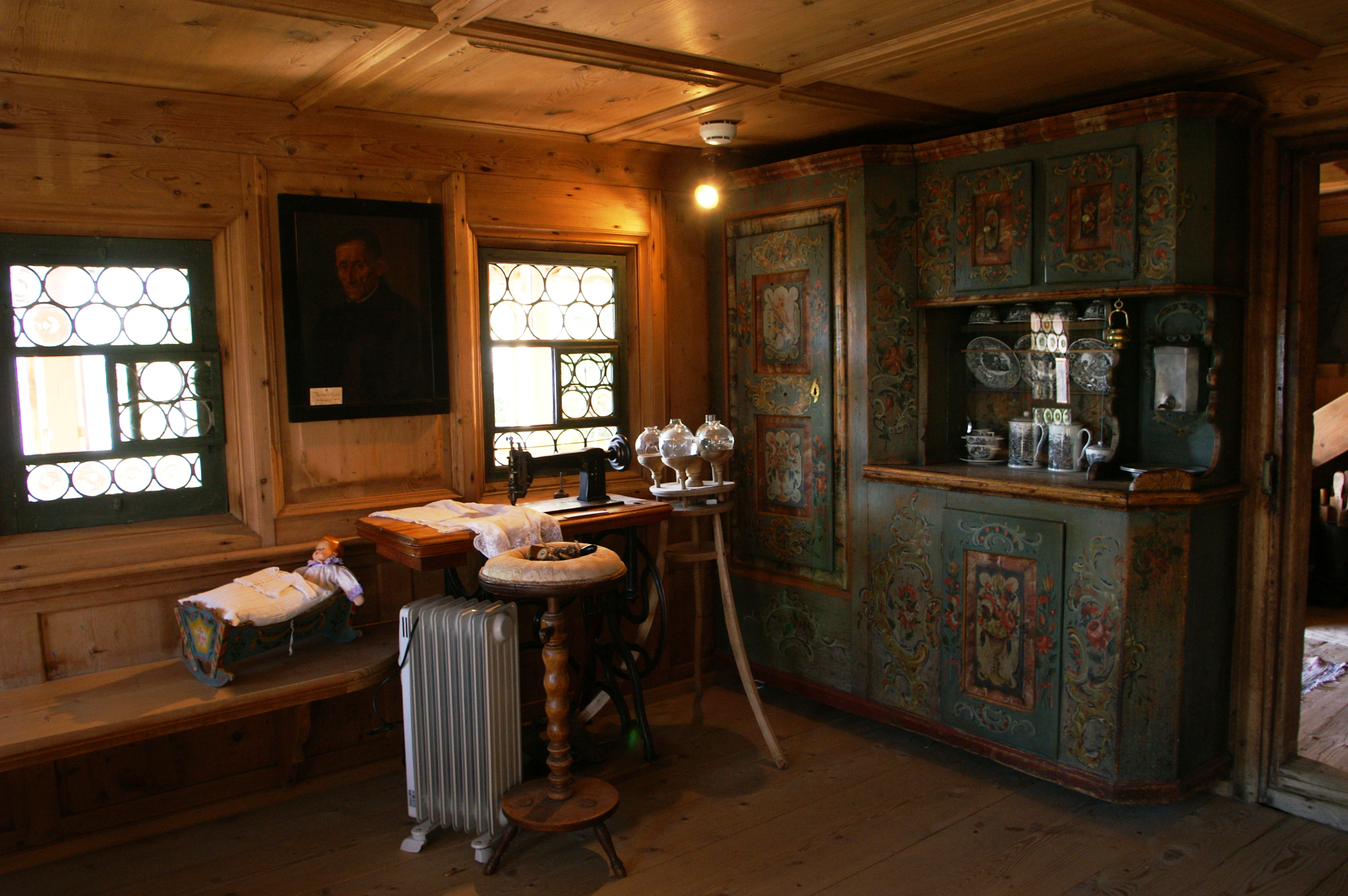 Angelika Kauffmann-Museum in Schwarzenberg im Bregenzerwald